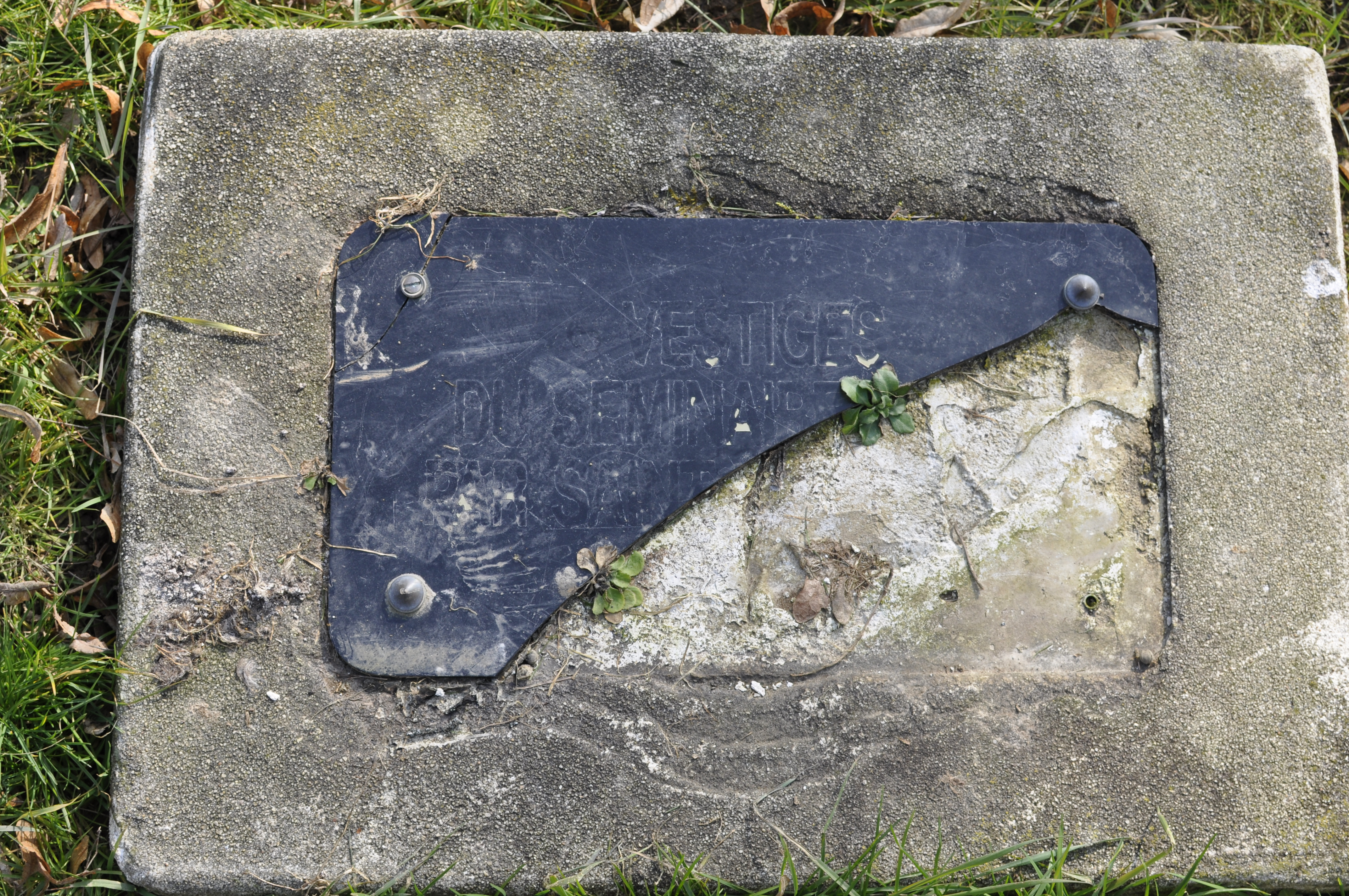 plaque symbolisant l'emplacement de l'ancien séminaire des Eudistes à Caen